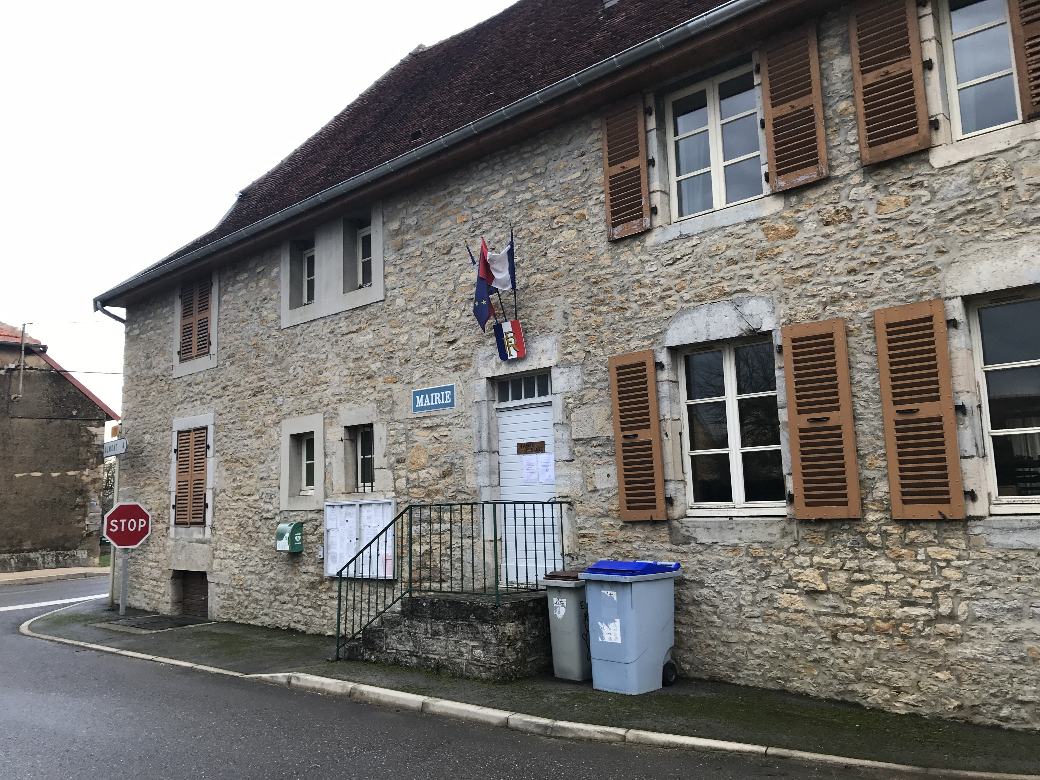 La Ferté (Jura, France) en janvier 2018.